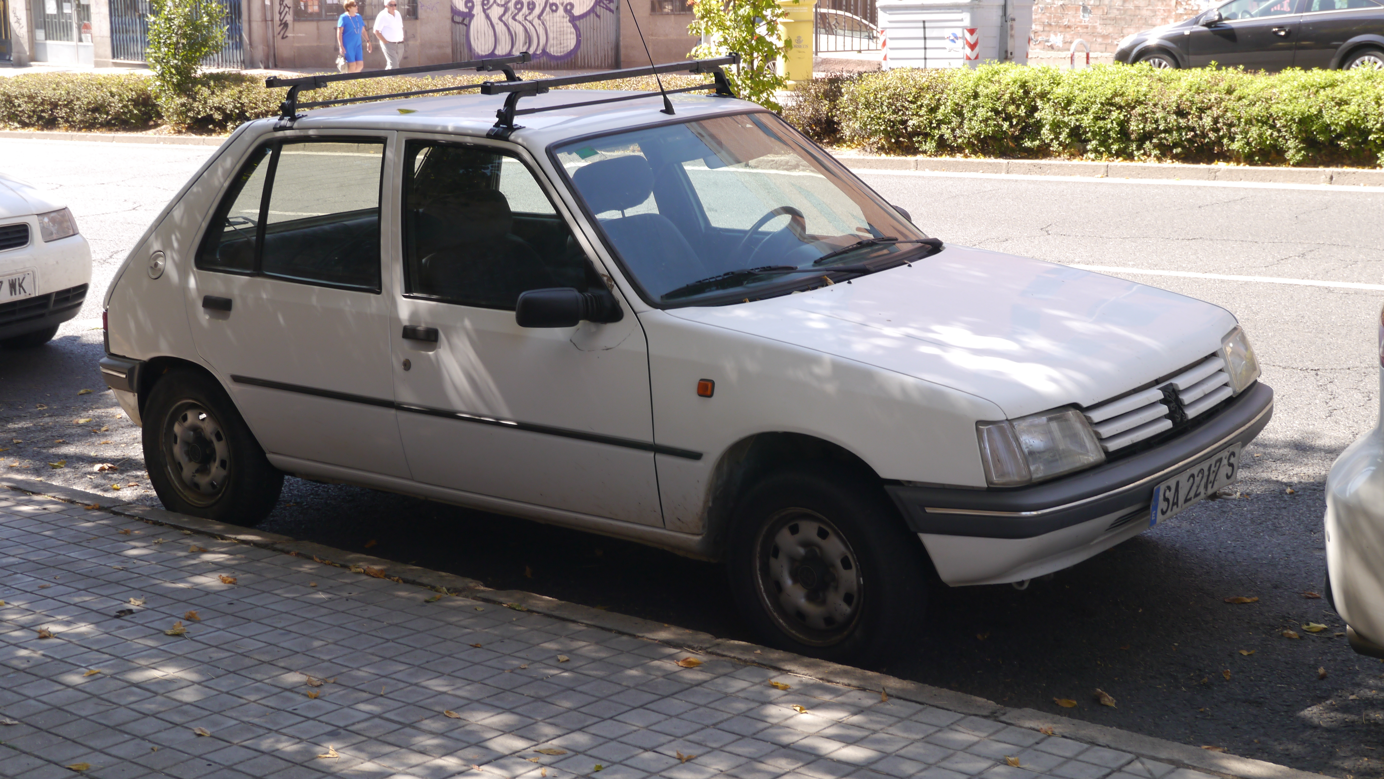 1996 plate in Salamanca, Spain.